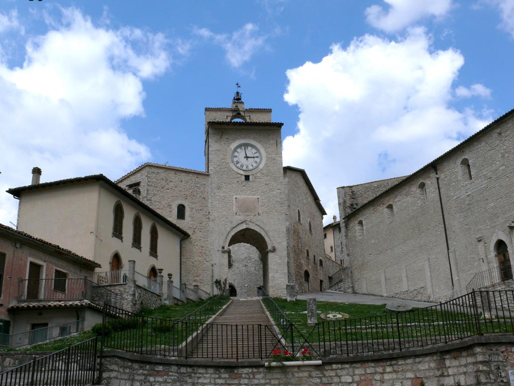 Torre dell'orologio